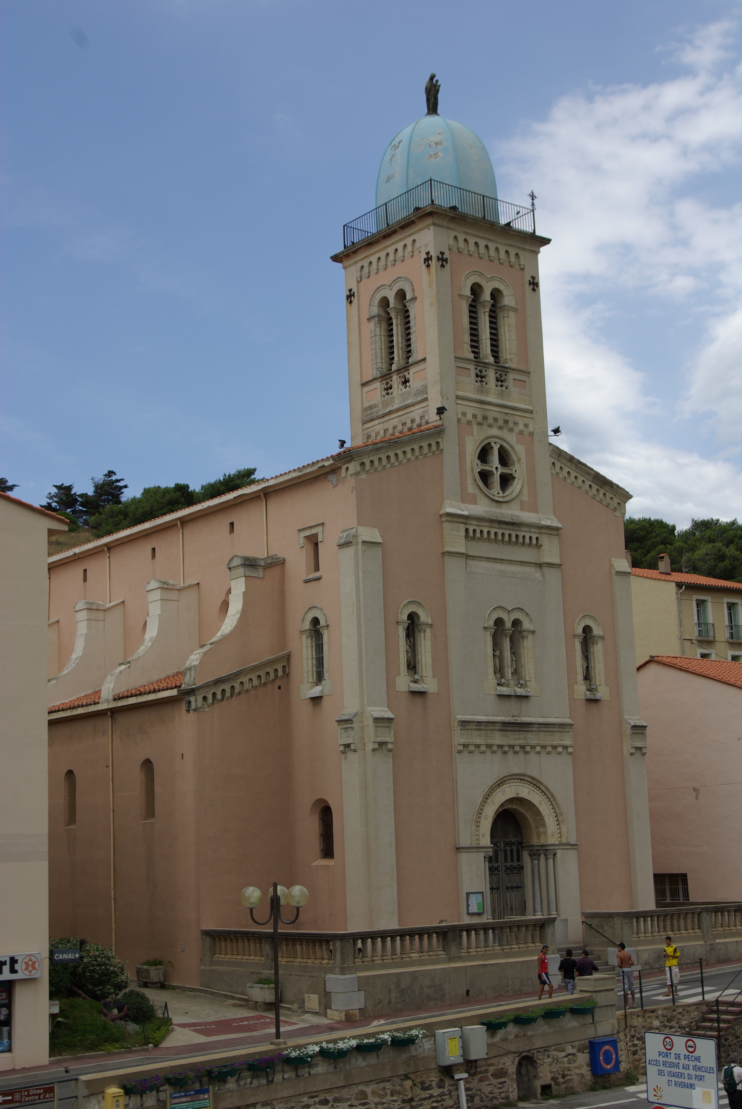 Church of Port-Vendres Église de Port-Vendres